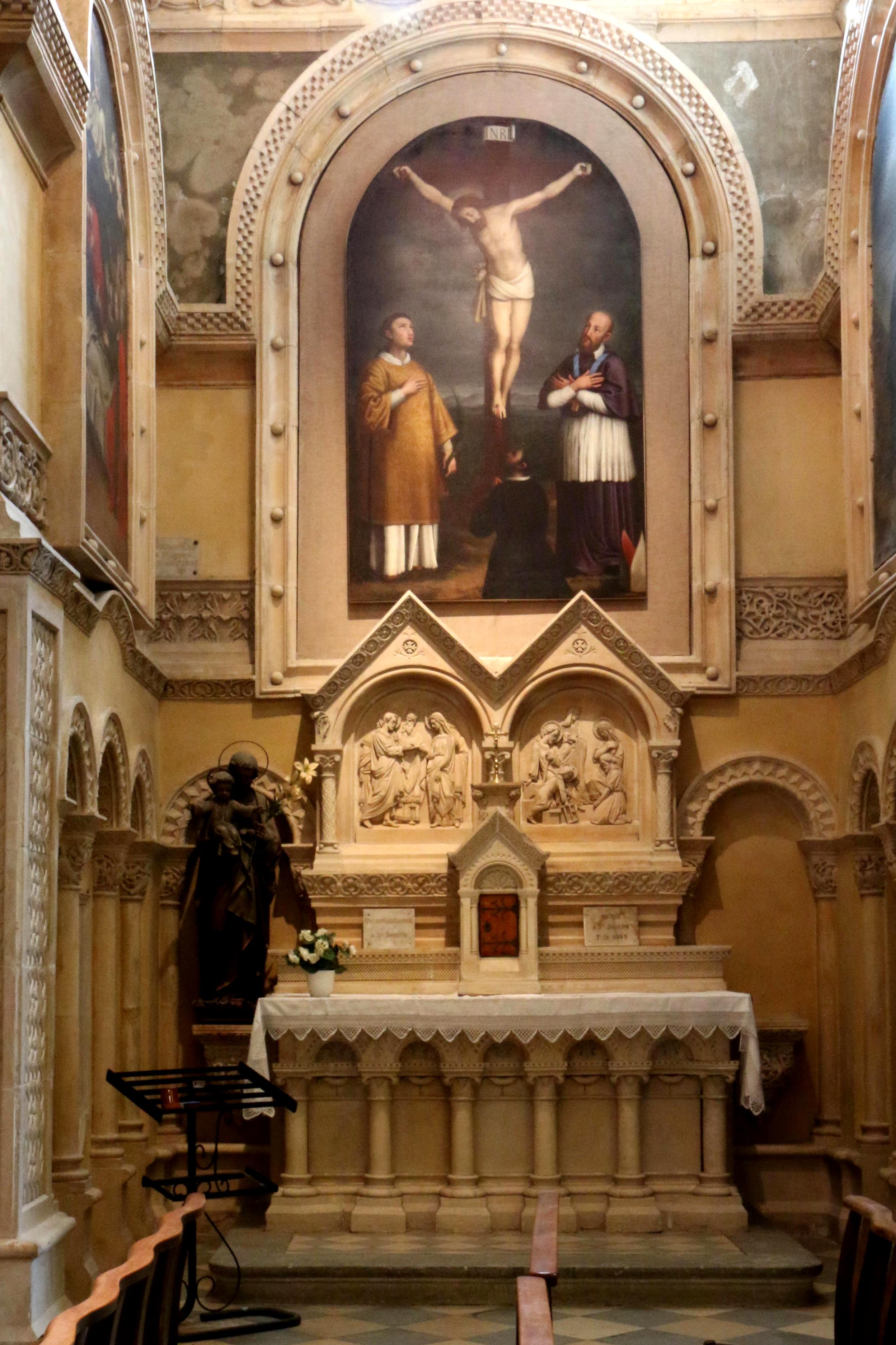 Chapelle Saint-Joseph de la cathédrale de Cavaillon. Au dessus de l'autel bas-relief représentant la sainte famille.